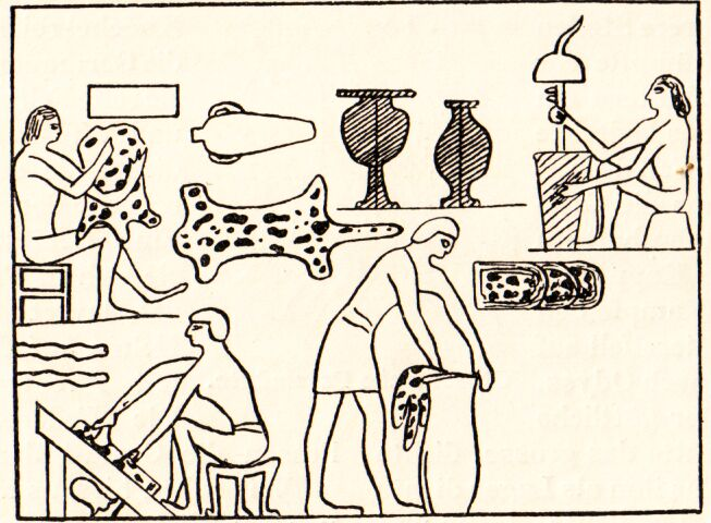 Altägyptische Kürschner. Aus dem Bilderzyklus im Grab des Kammerherrn To in Saggara (fünfte Dynastie, um das Jahr 3500 v. Chr).